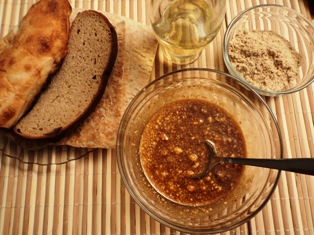 Հայկական զաաթեր՝ թաթխան